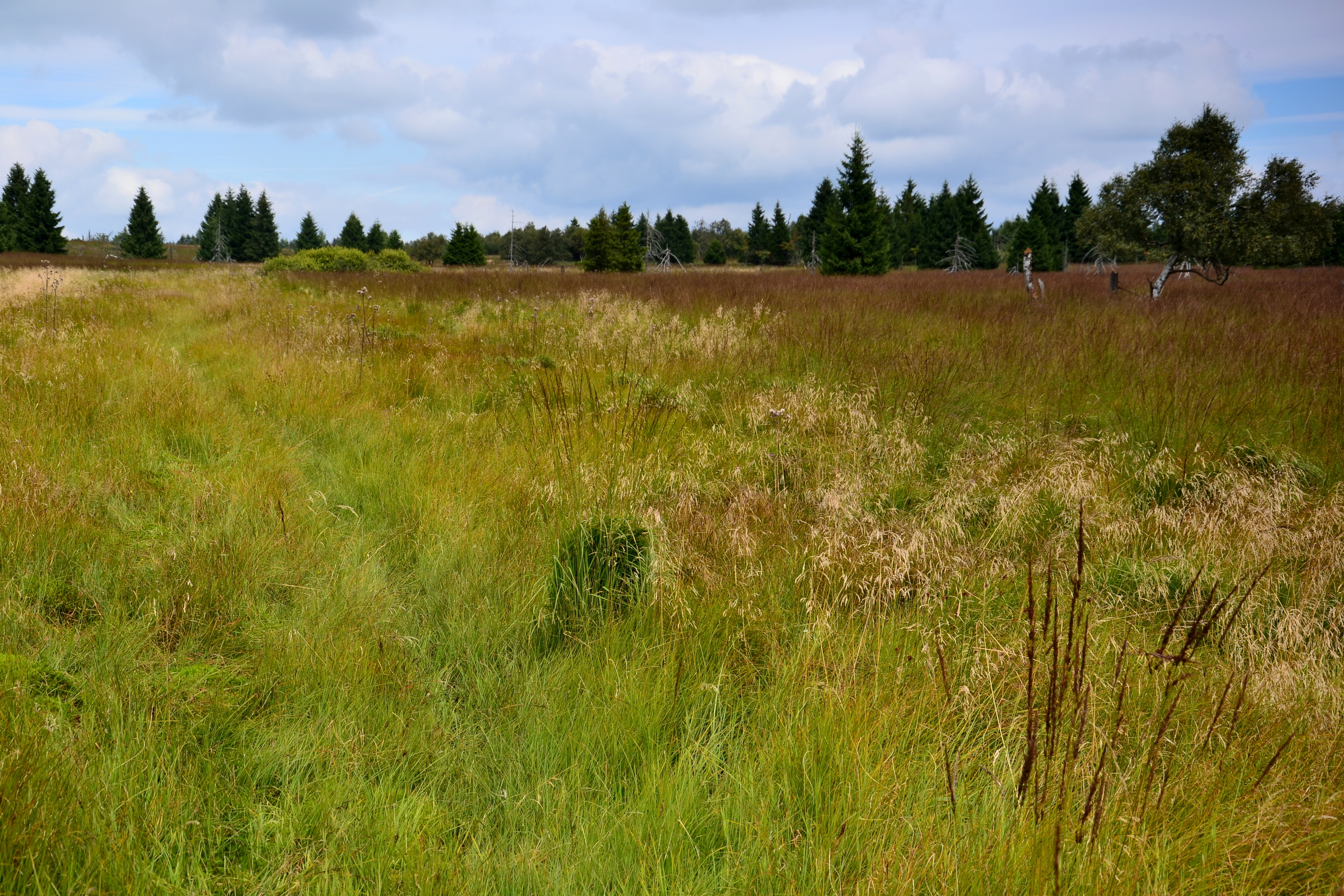 Přírodní rezervace Grünwaldské vřesoviště